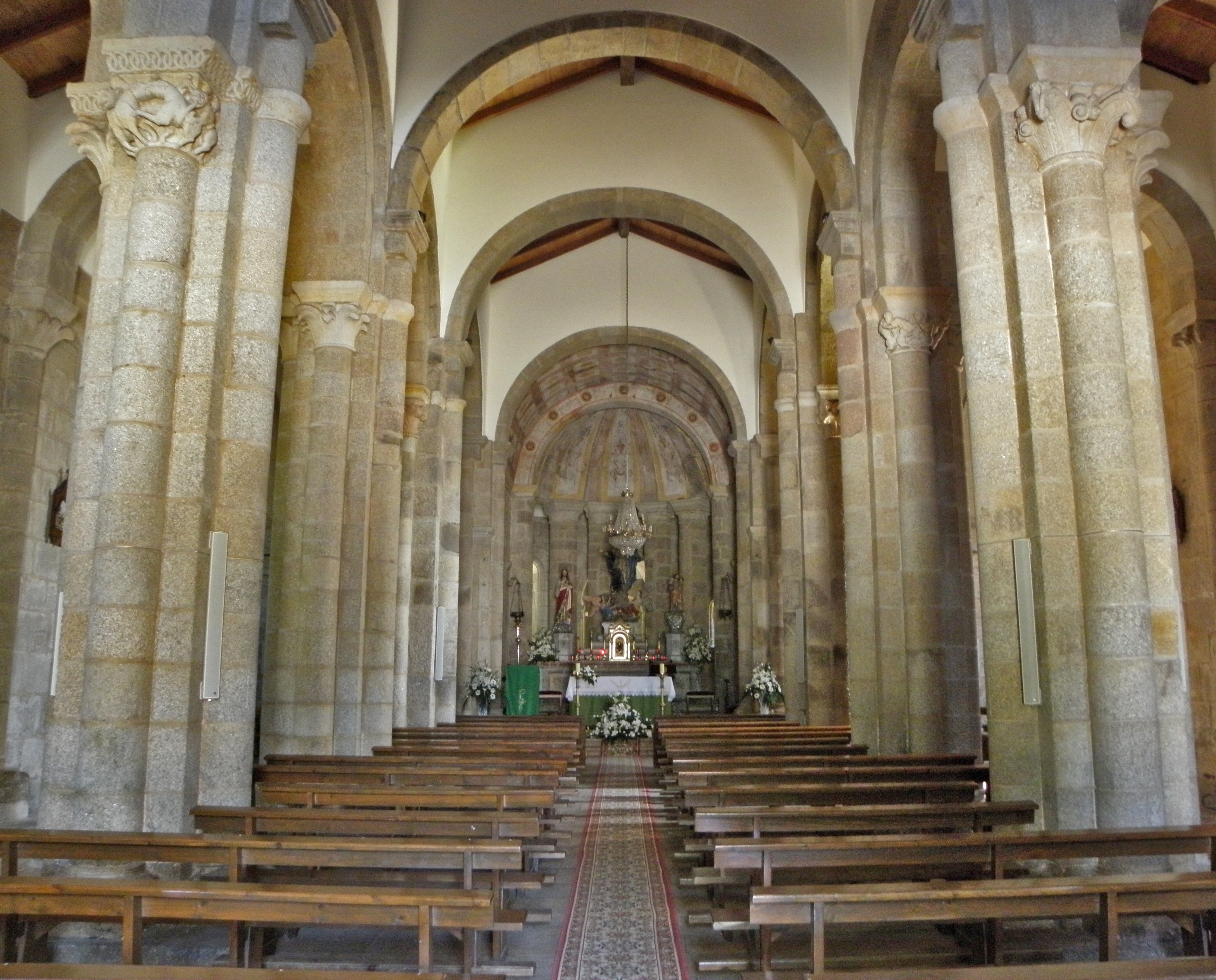 Igrexa Santa María de Cambre